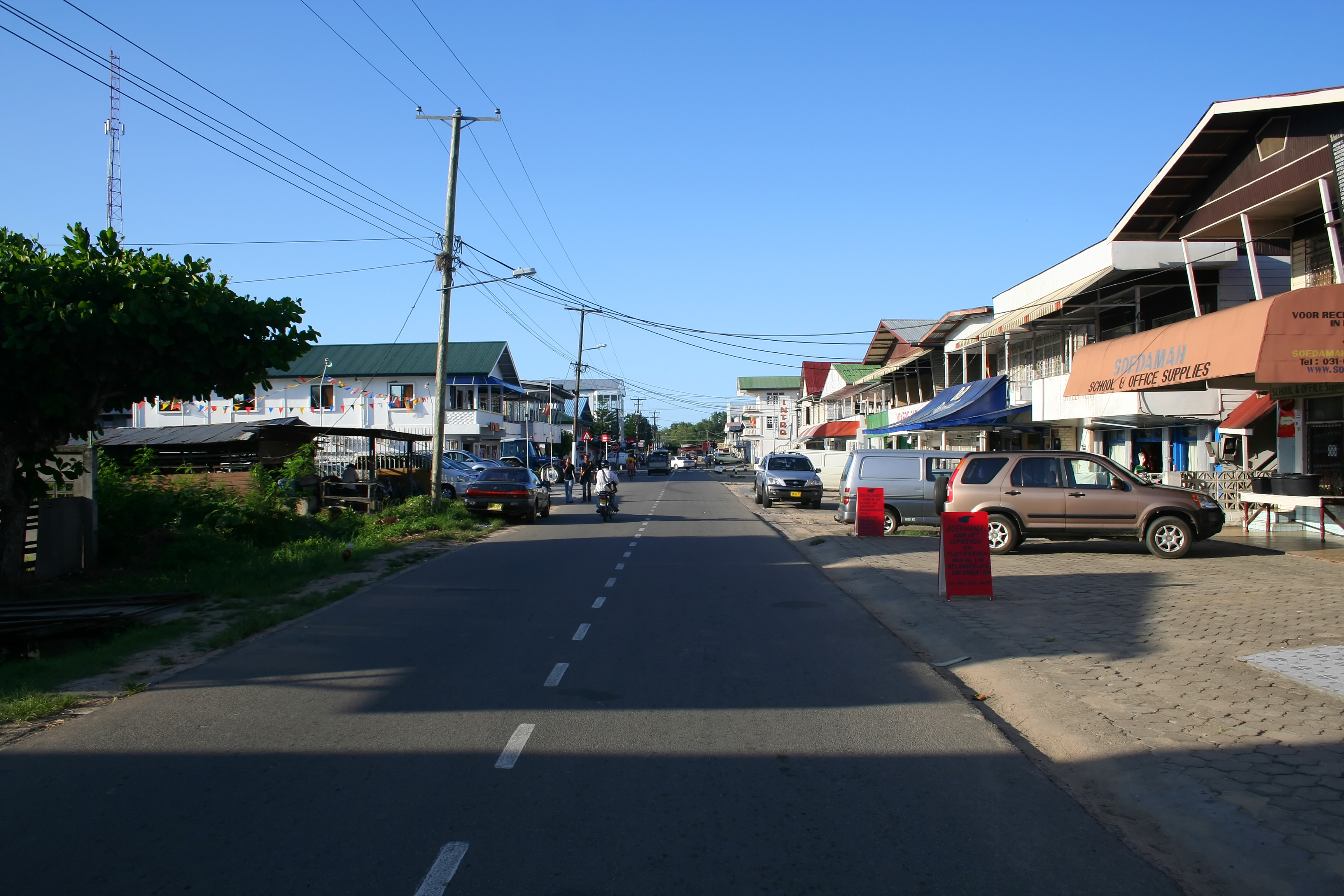 Scene in Nieuw Nickerie, Suriname